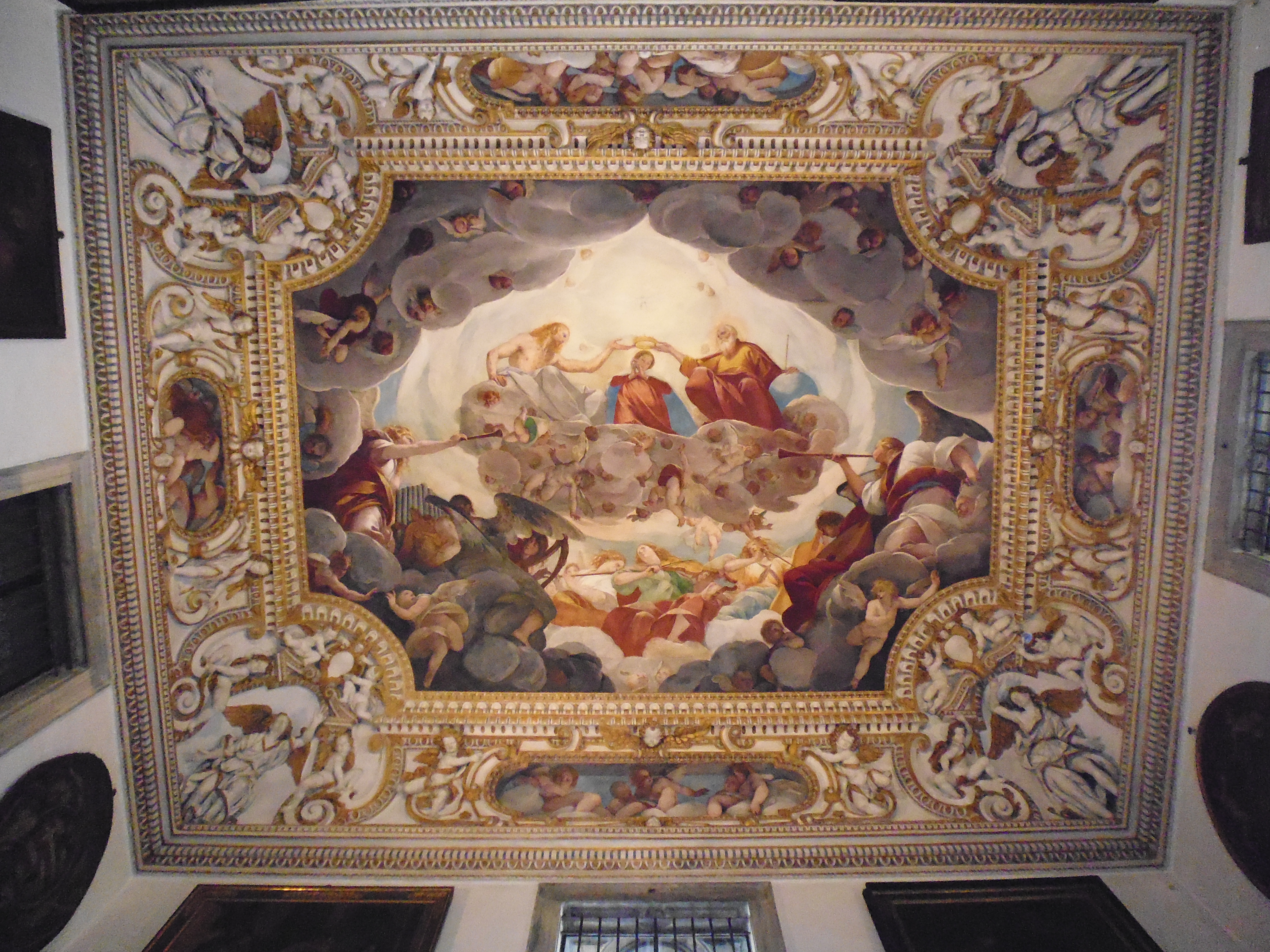 Cattedrale di Como This is a photo of a monument which is part of cultural heritage of Italy.